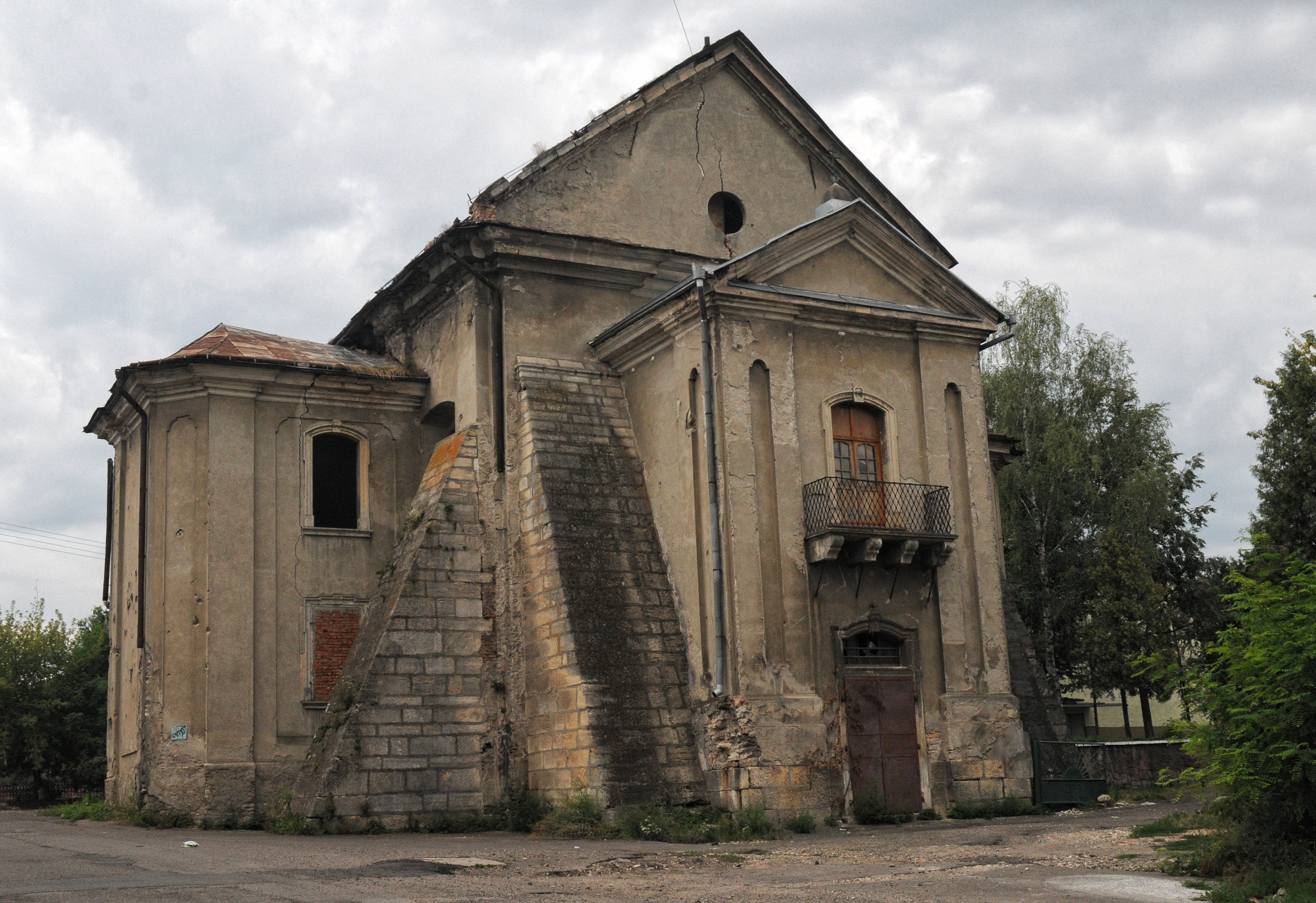 Городенка, вірменський костел